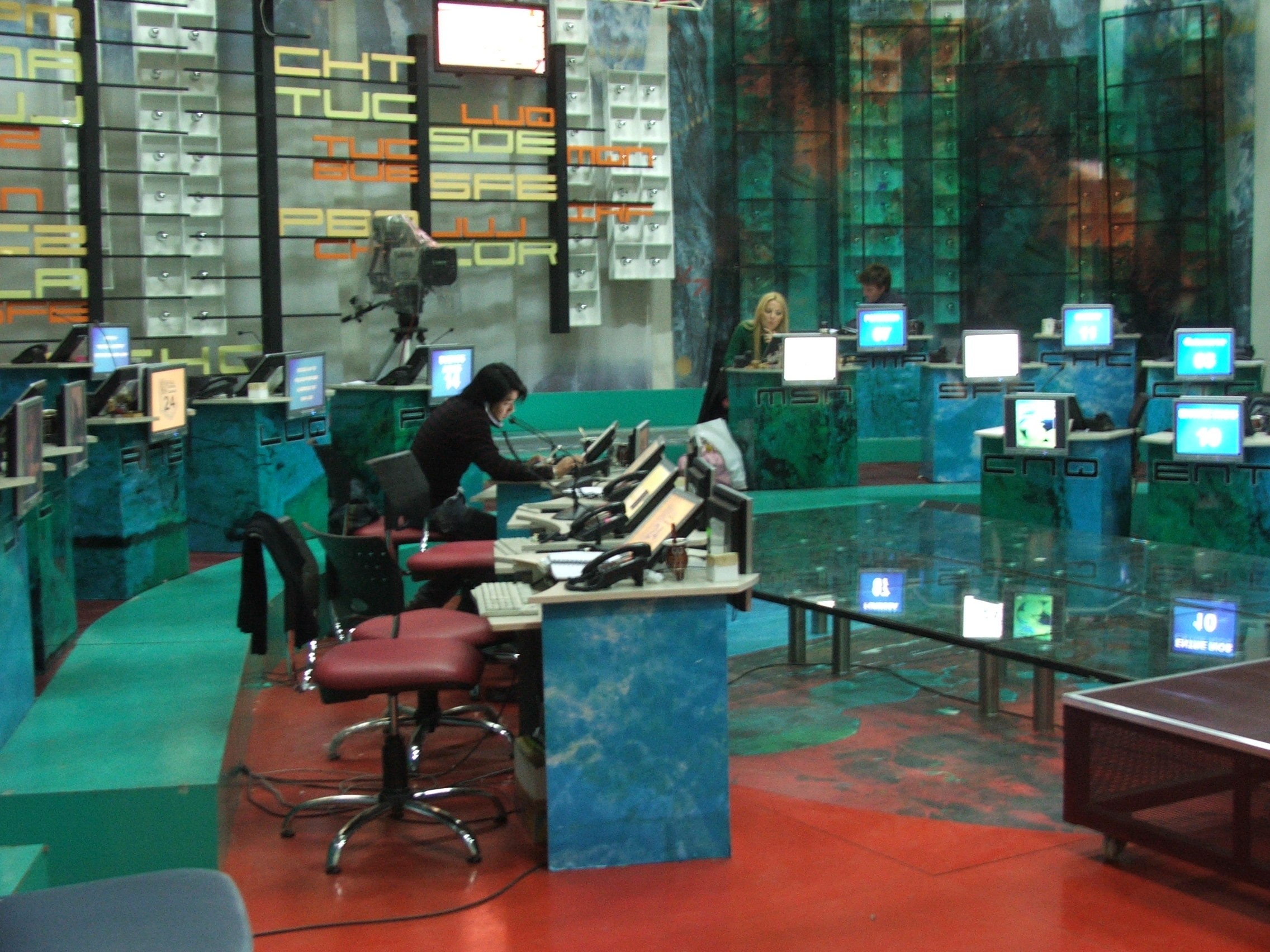 Luego de la salida del Aire, los integrantes del equipo de Estudio Pa{is 24 contin{uan trabajando en sus lugares.